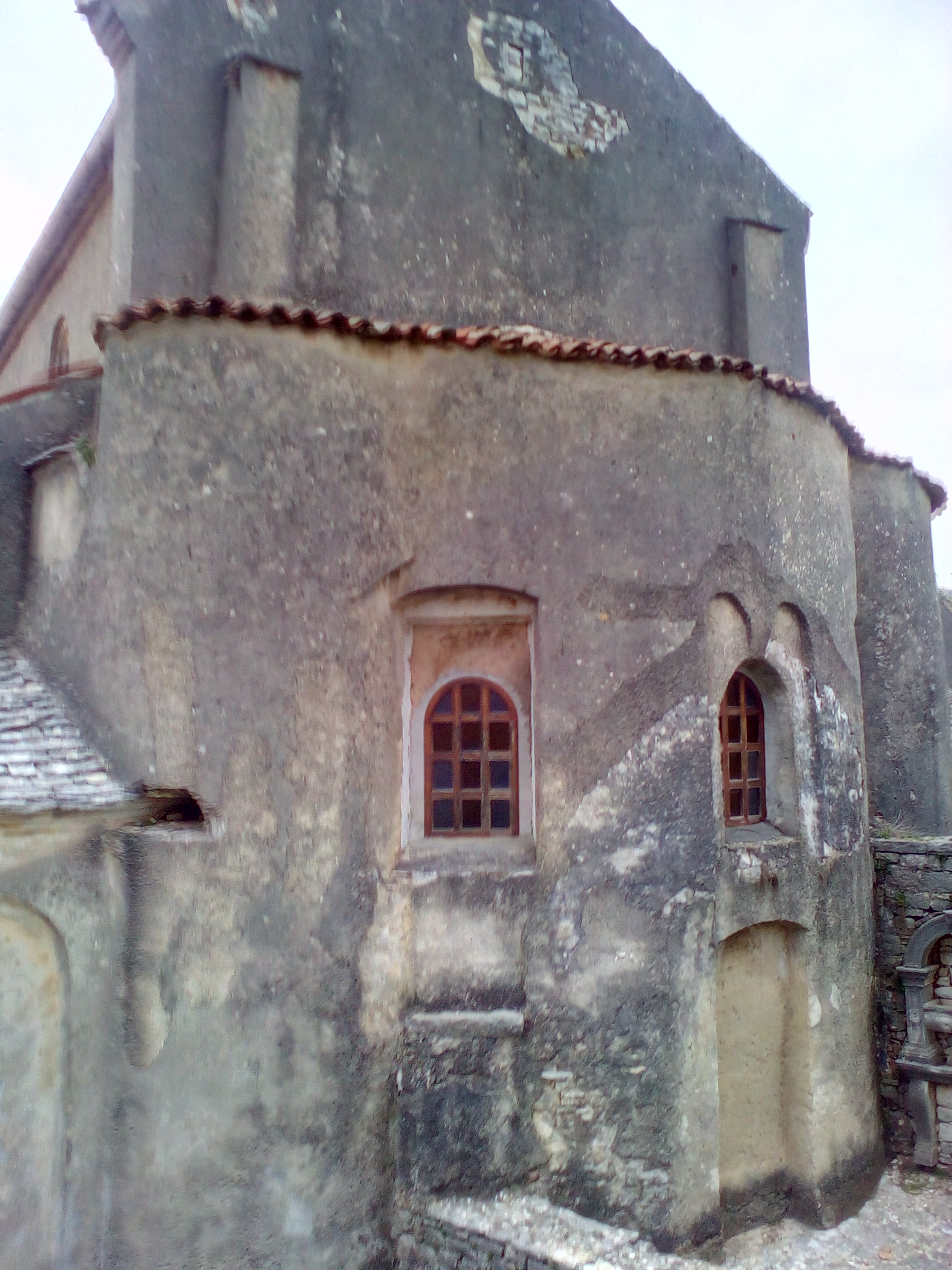 crkva sv. Martina slikana od iza